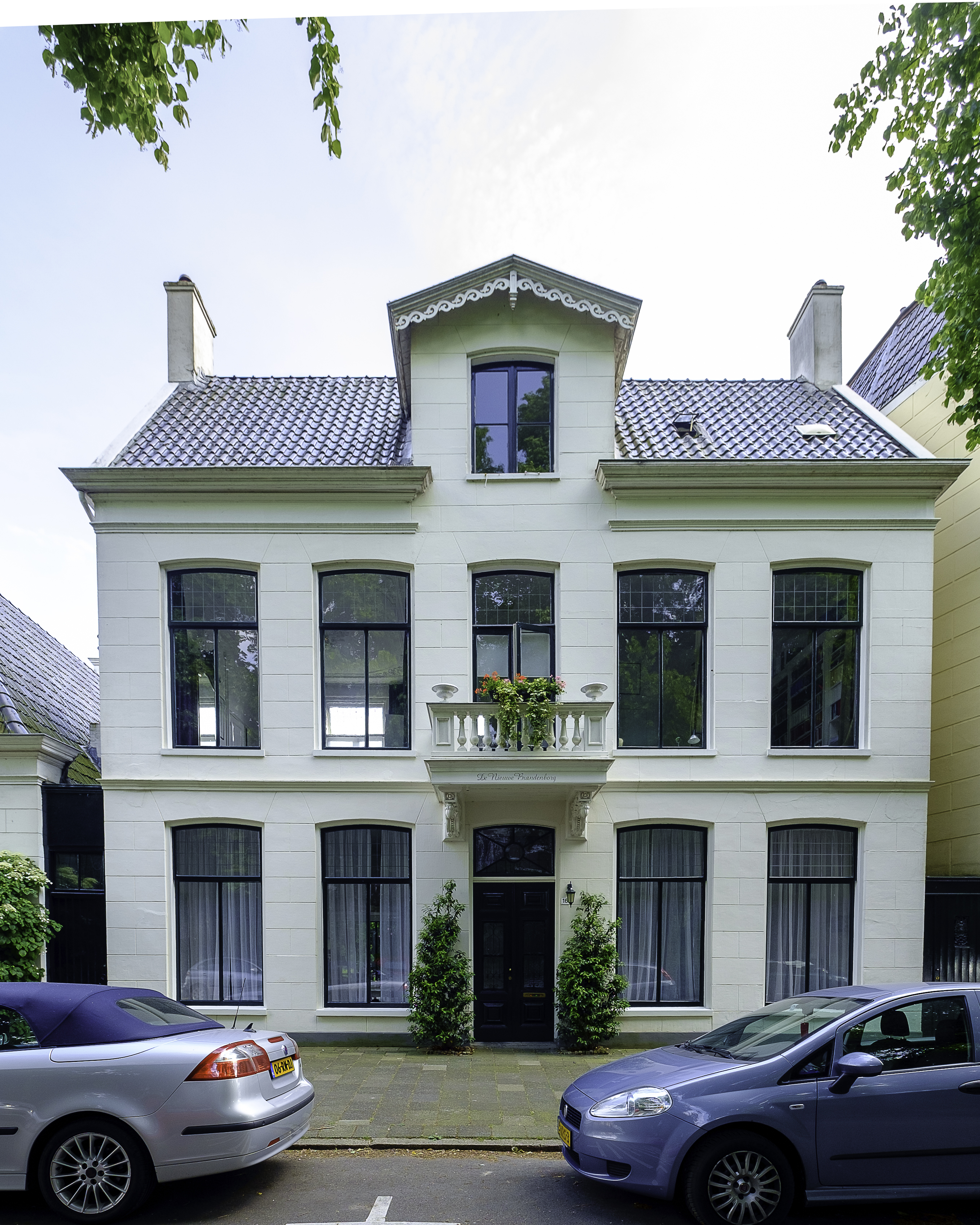 Parklaan 16 in Groningen. Voormalige praktijkruimte Jan Kremer